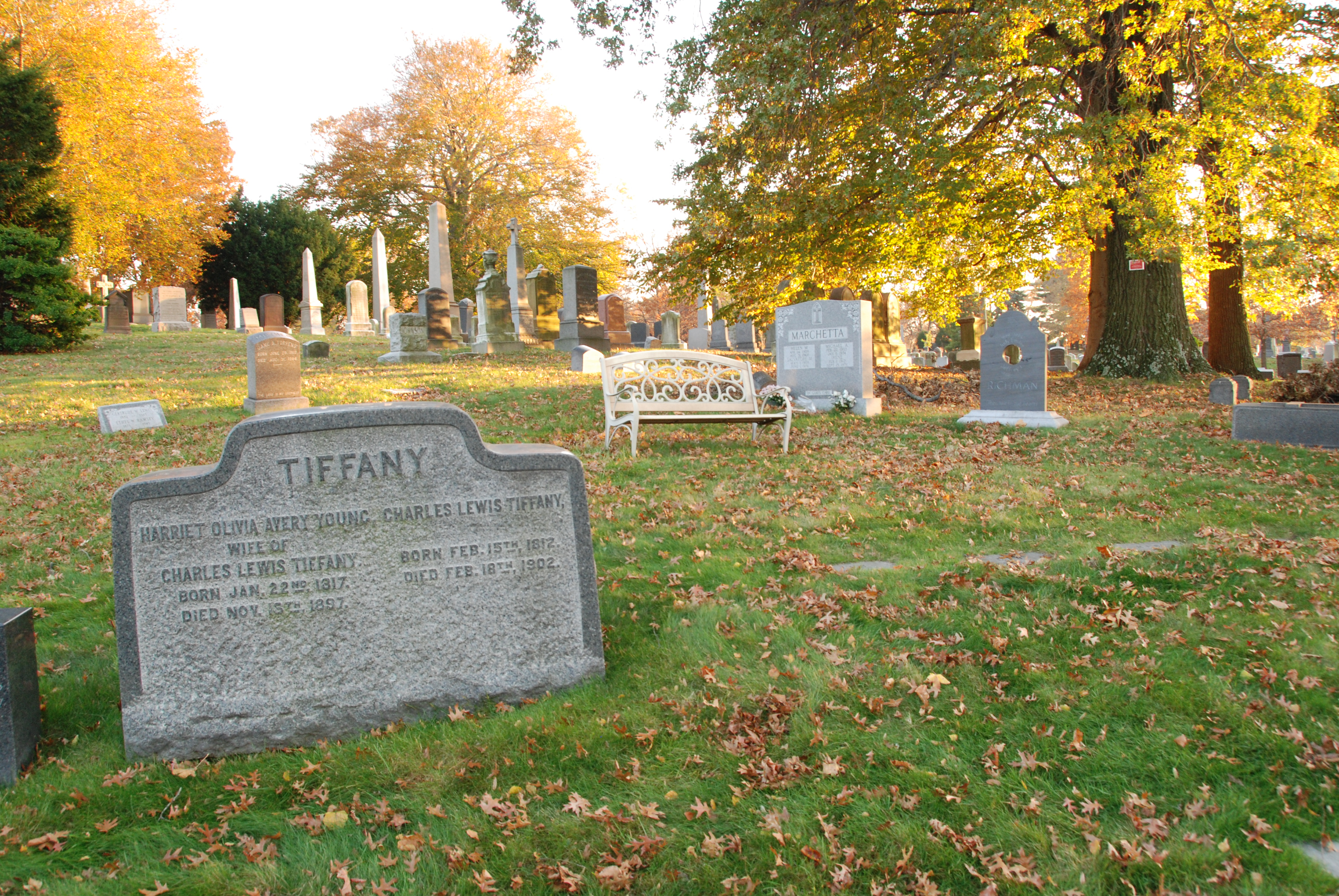 Tiffany